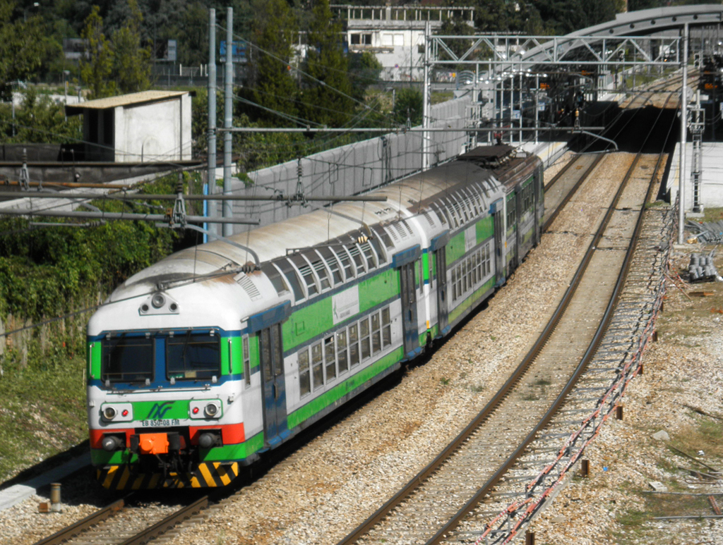 Un treno regionale Trenord in servizio sulla tratta Milano–Asso entra nella stazione di Milano Nord Affori.